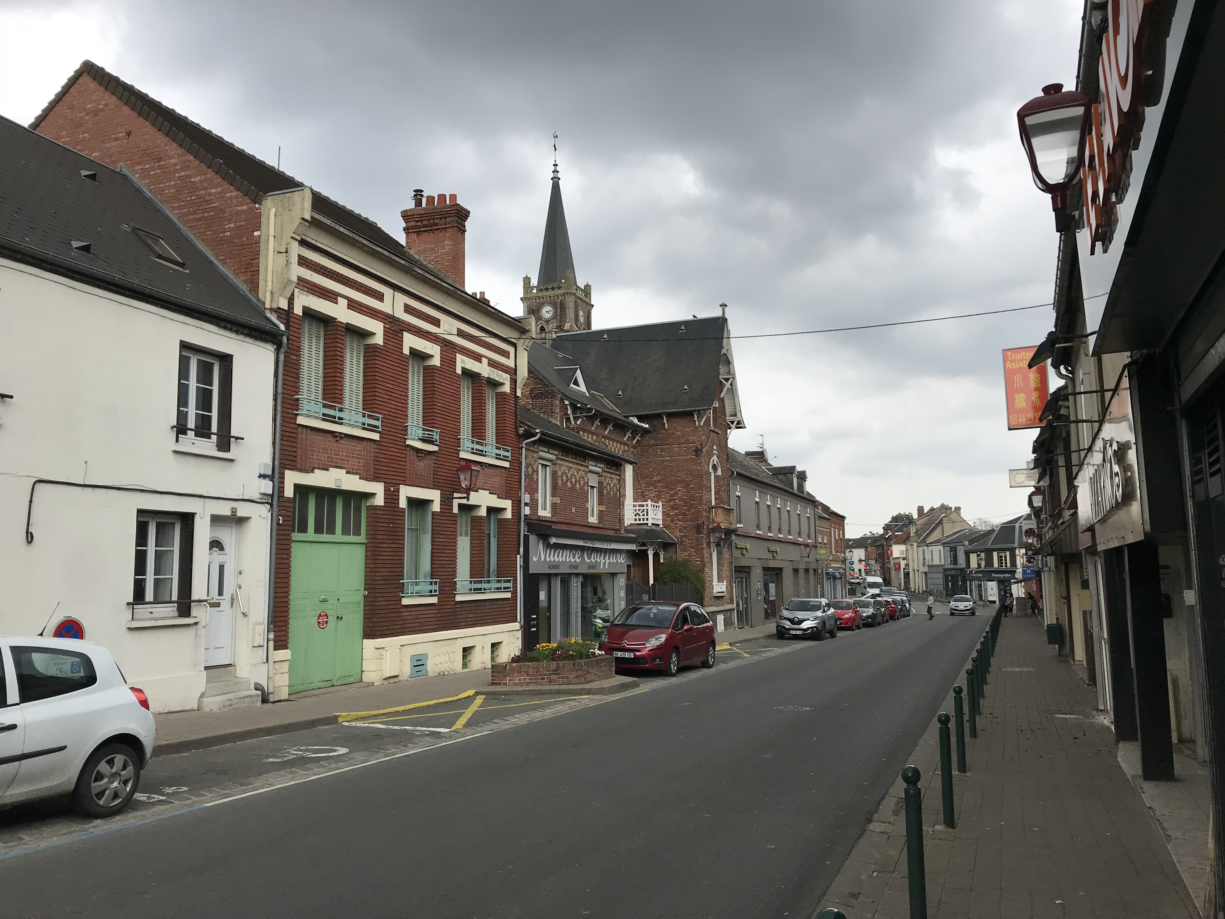 Paysage urbain de St Just en Chaussée (60)